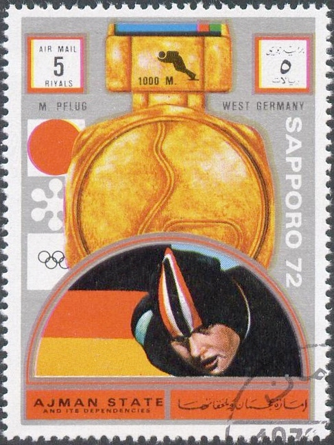 Monika Pflug